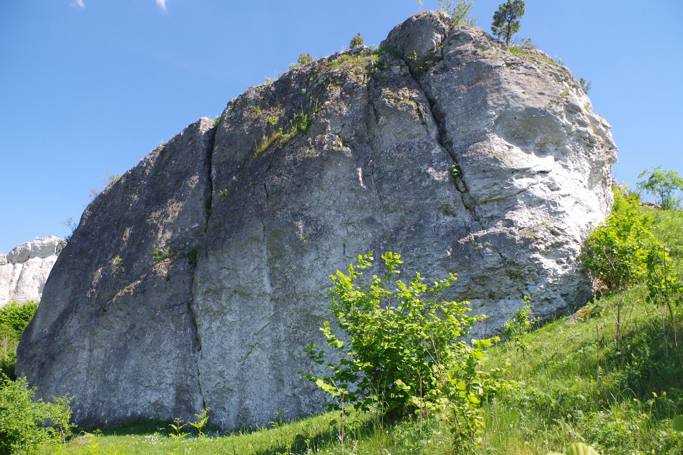 Skała Płetwa na wzgórzu Lipówki w Olsztynie